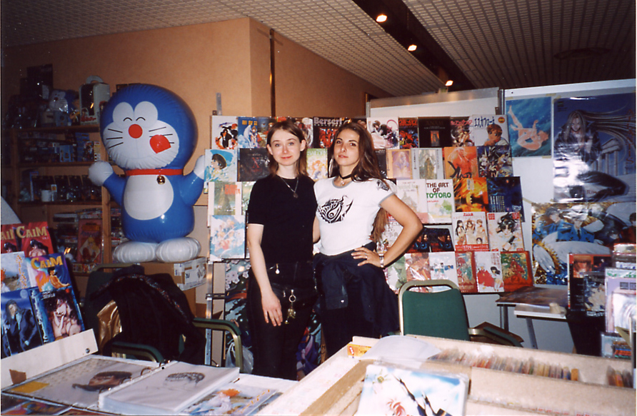 Le Peruggine ad una fiera di fumetti a Milano, Quark Hotel.